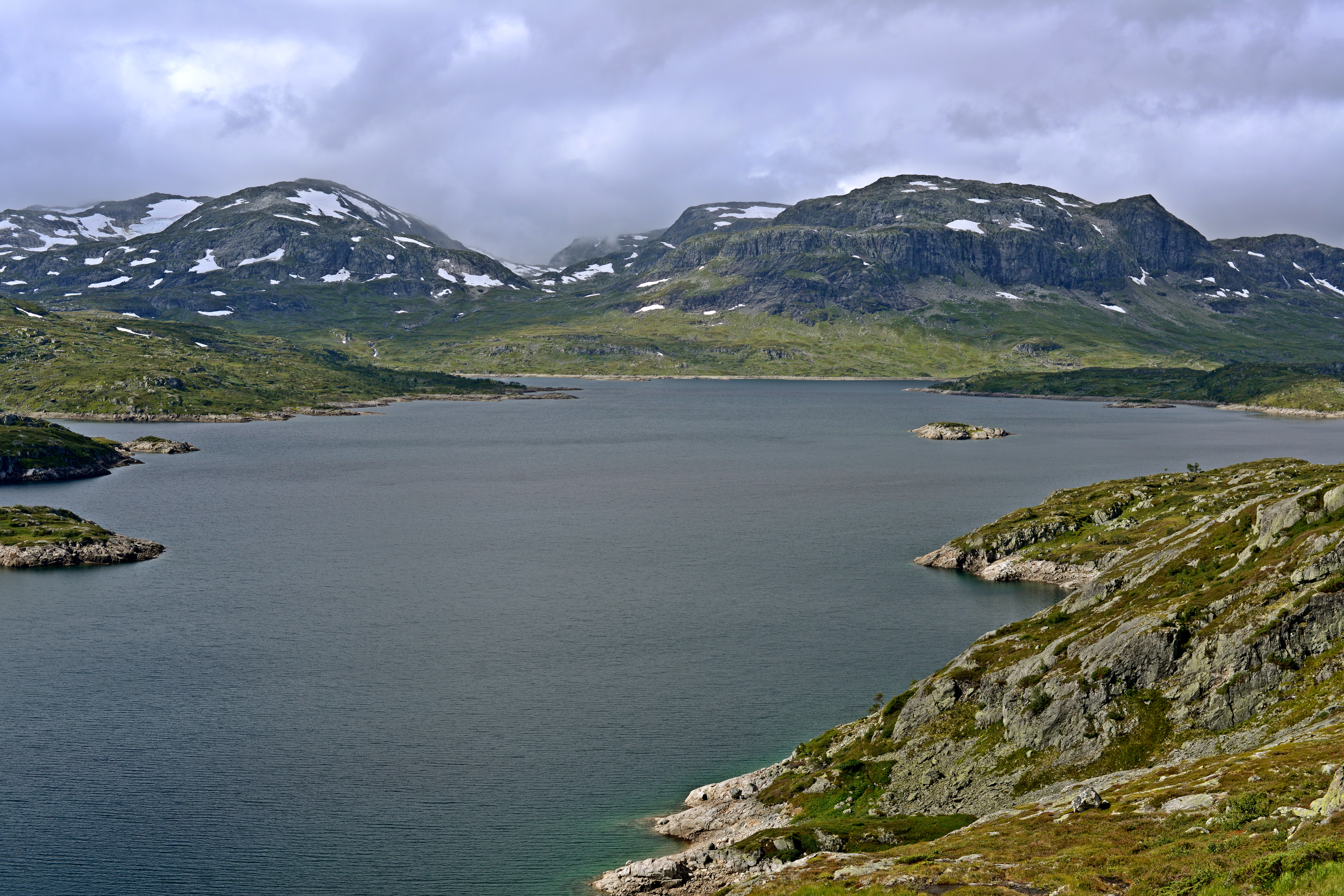 Kjelavatn i Vinje